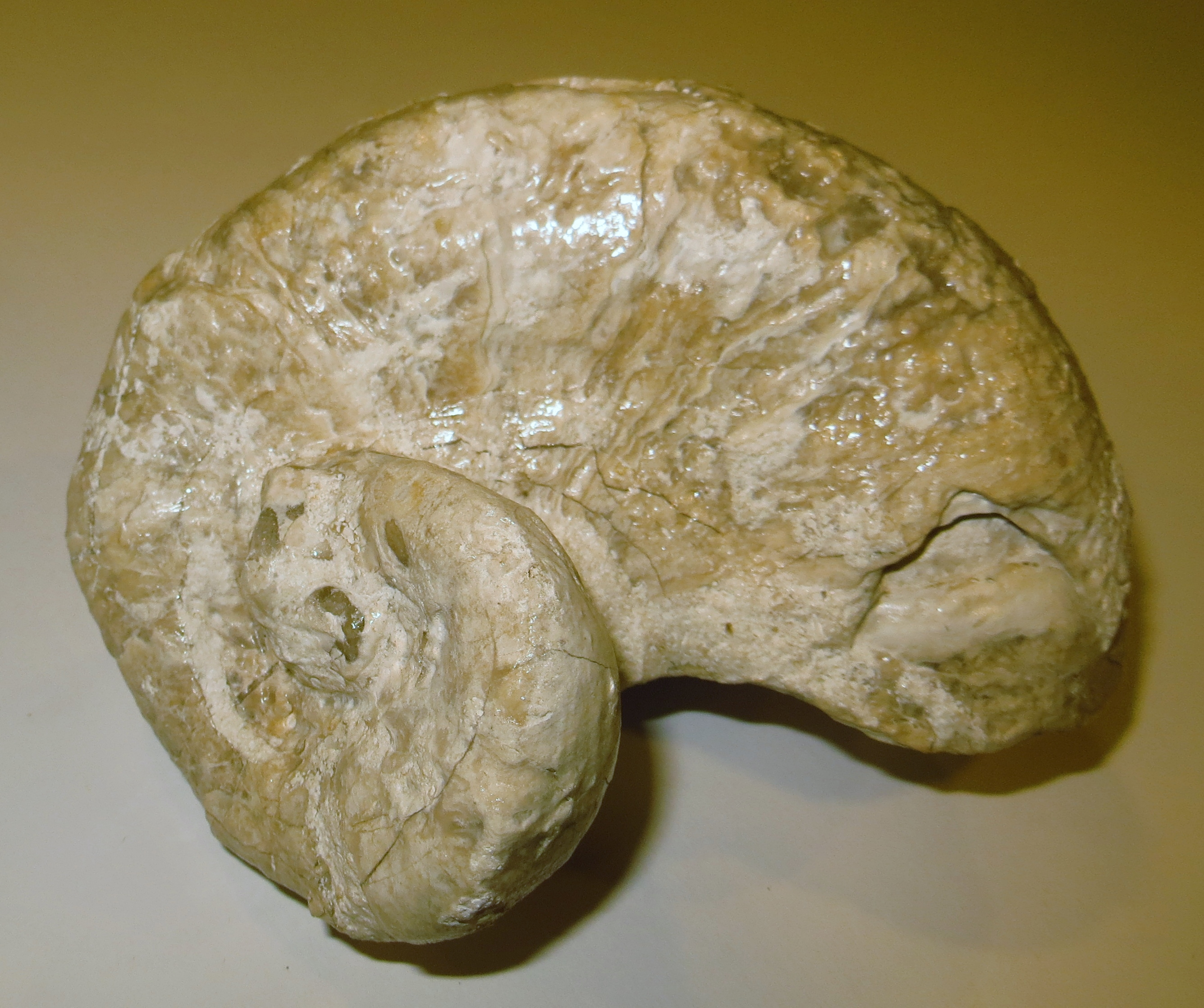 Fossil of Requienia- Took the picture at Muse, Trento (Italy)